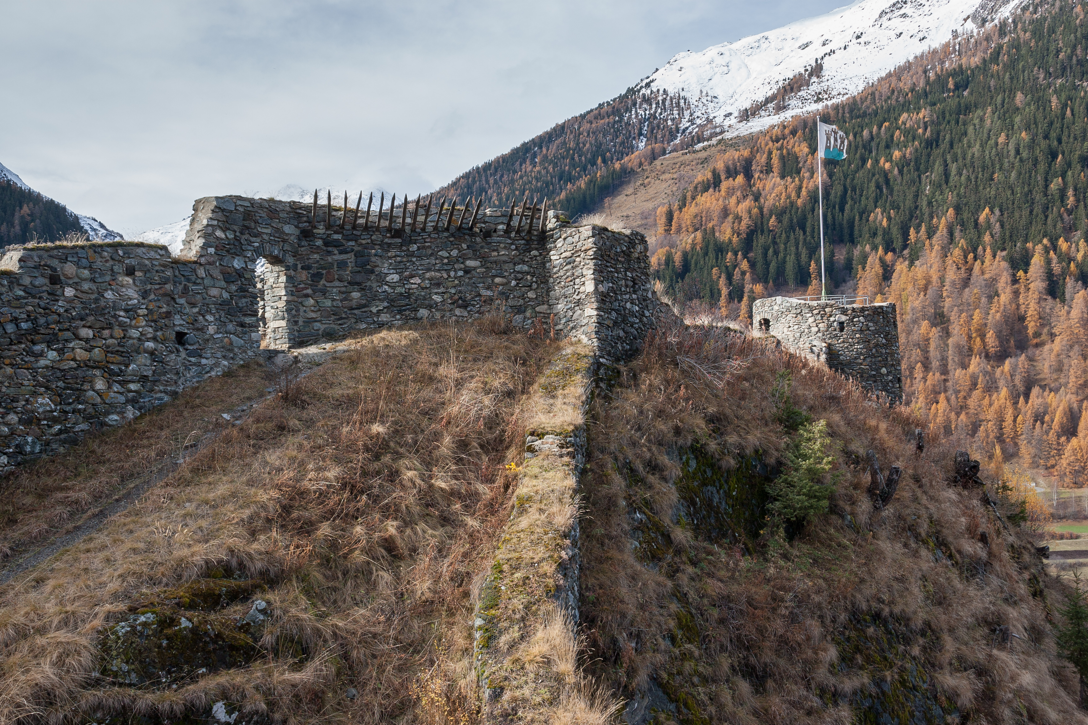 Ruina Chaschinas bzw. Fortezza Rohan bei Susch GR